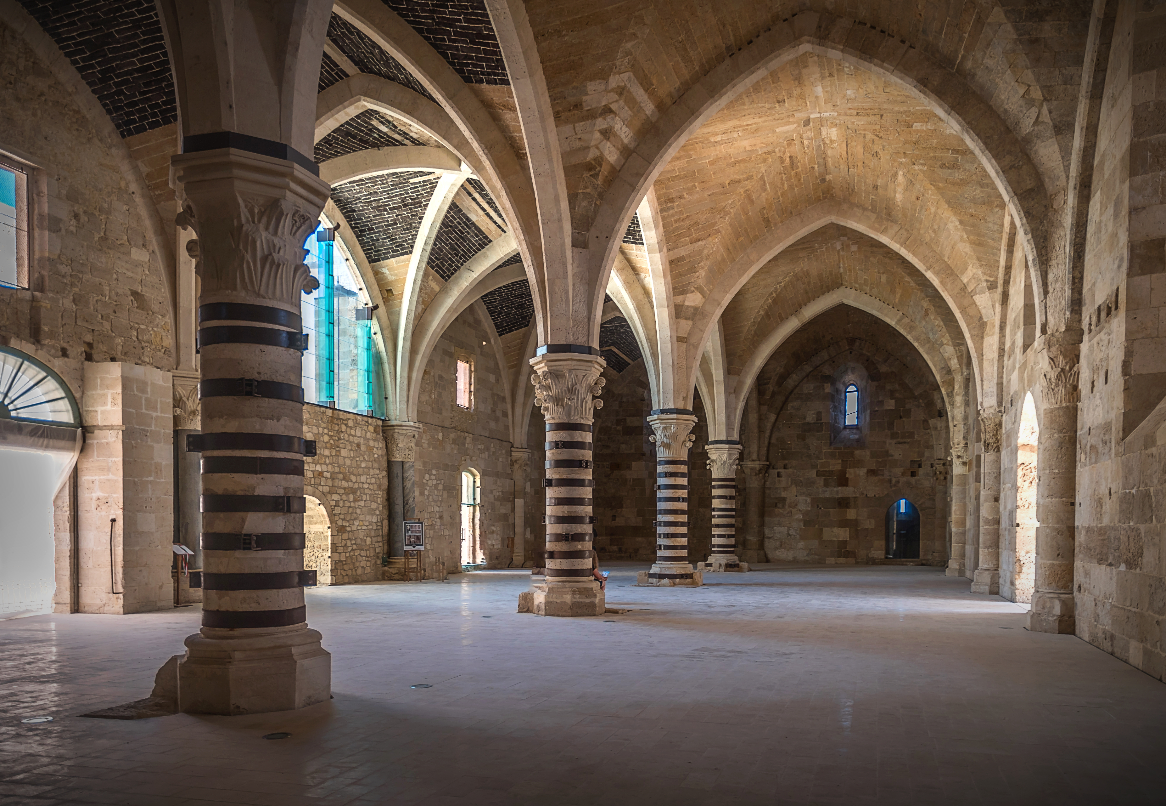 Die gotische Säulenhalle des Castello Maniace mit Kreuzrippengewölbe